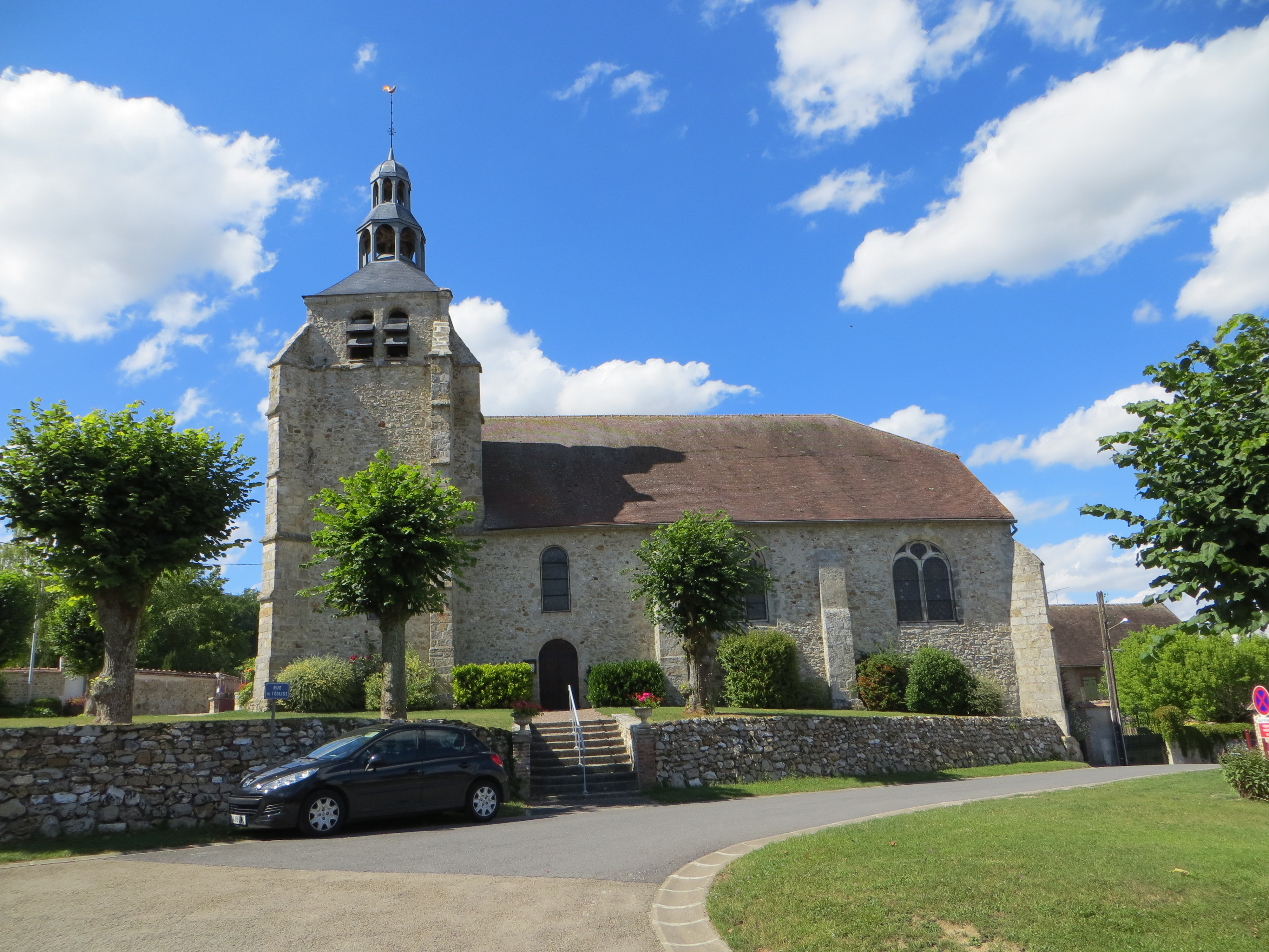 Vue générale de l'église